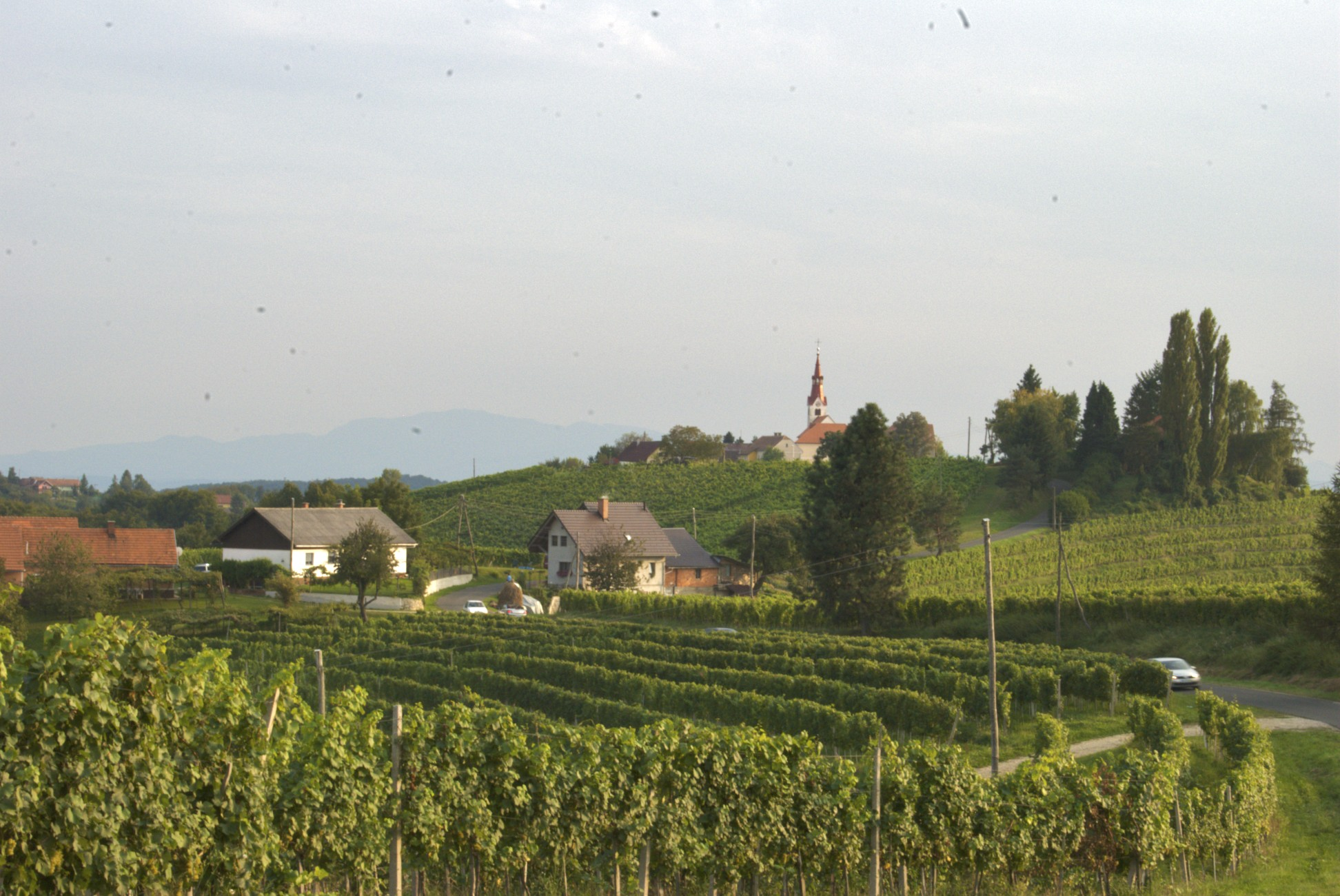 Vignoble de Jeruzalem, Ljutomer, en Slovénie Jeruzalem, Ljutomer, Slovenia.